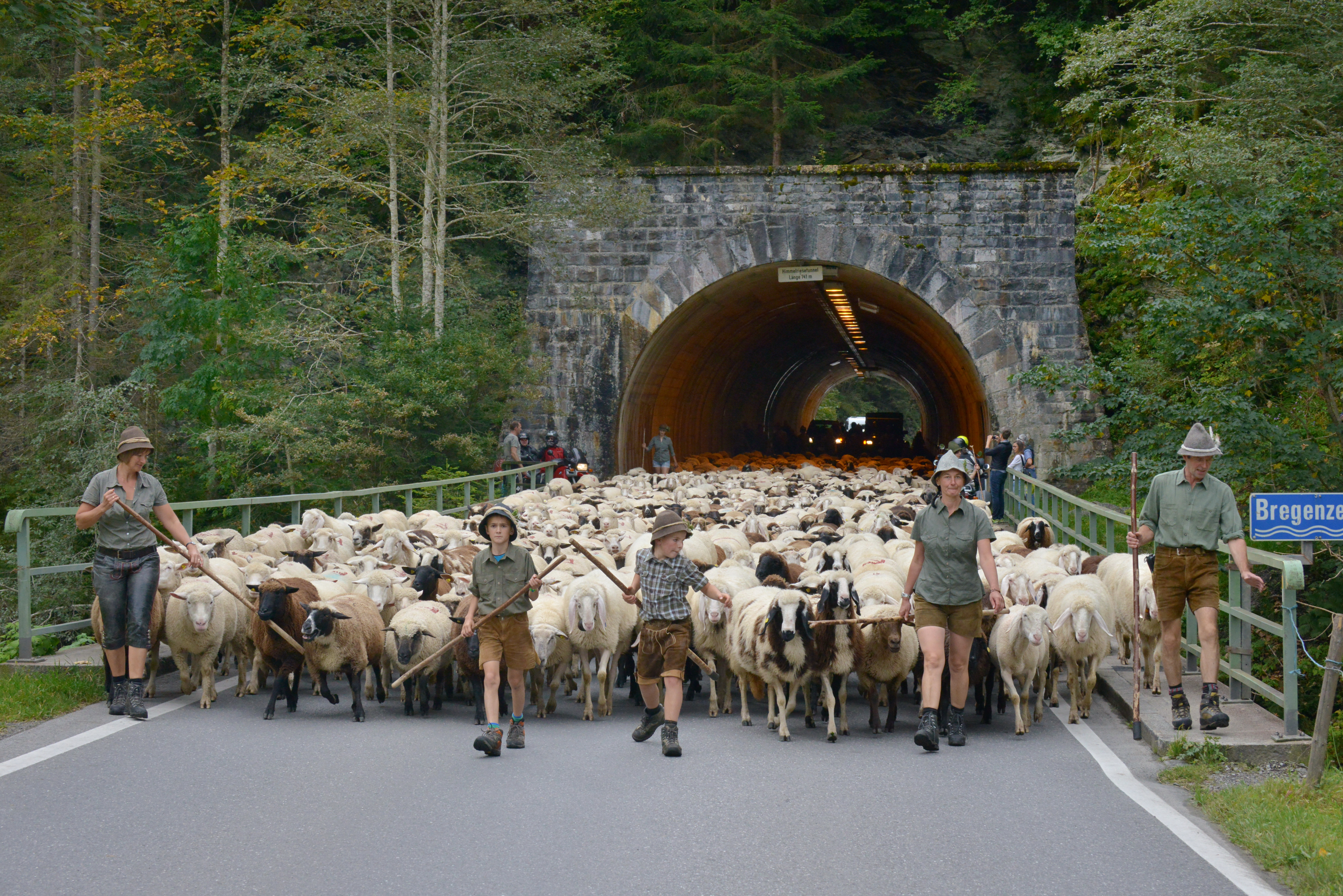 2014, Almabtrieb der Schafe von Schröcken nach Schoppernau im Bregenzerwald Dieses Highlight wird mit dem “Veahmätle” (kleiner Viehmarkt) gefeiert.